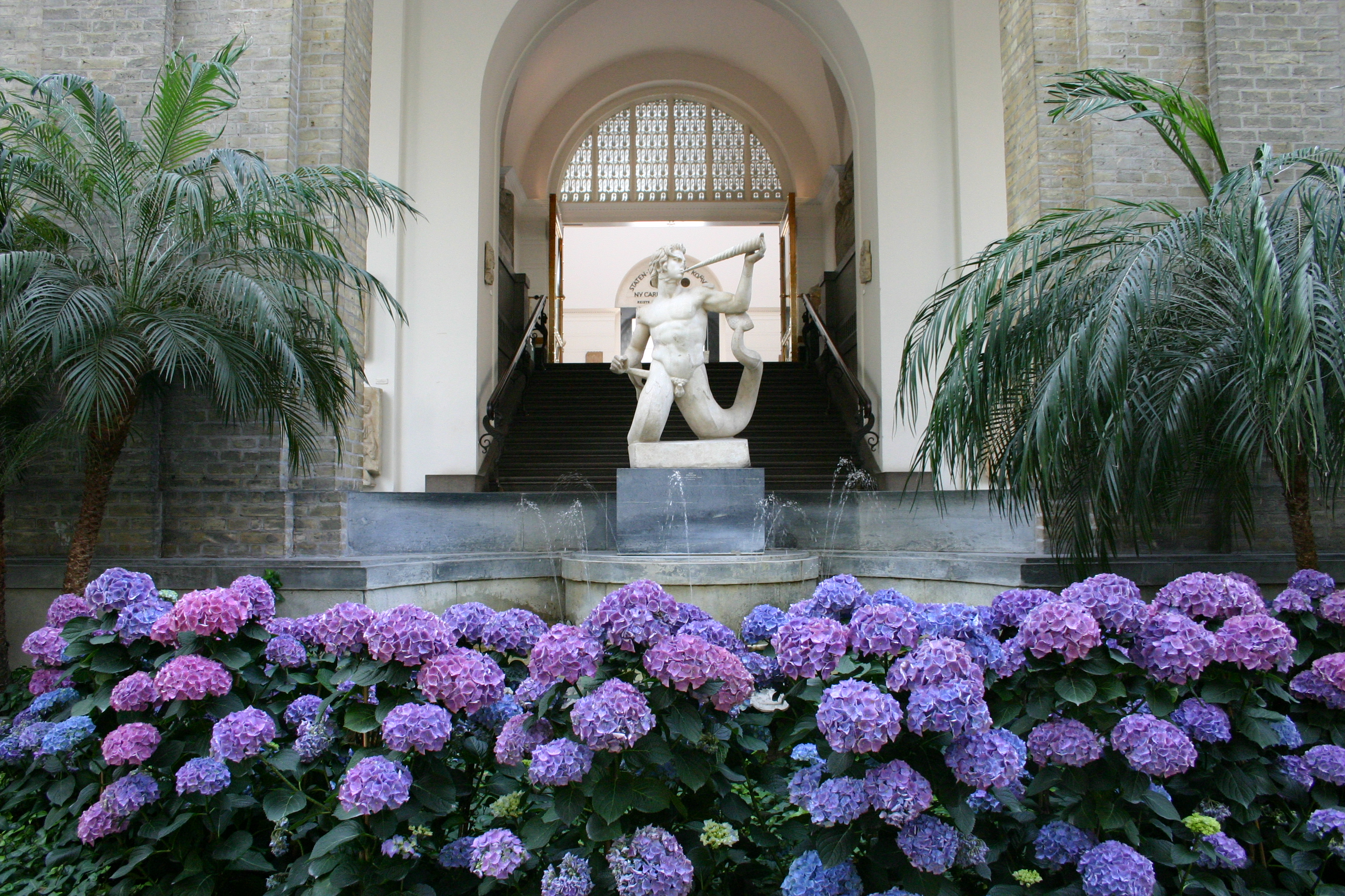 Winter garden in Ny Carlsberg Glyptotek, Copenhagen. Photo by Bertil Videt 2005.